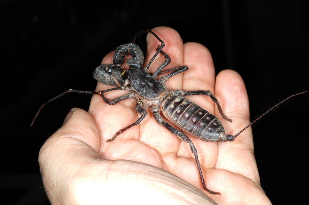 Mastigoproctus giganteus, Uropyge dans la main